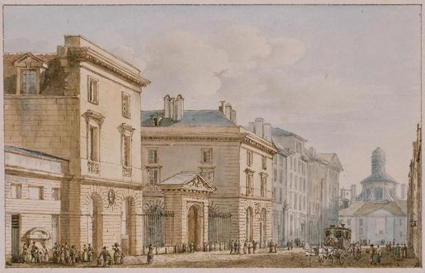 Vue du Collège impérial de France, institué par François Ier en 1530, pour l'Enseignement des langues grecque, latine et hébraïque, la Philosophie, l'Art oratoire, la médecine, etc... et restauré sous le règne de Louis XV par M. Chalgrin, architecte ; il est situé place de Cambray, à Paris. vers 1810 aquarelle - 0.670 m x 0.117 m Malmaison, châteaux de Malmaison et Bois-Préau Don Mr et Mrs John Jaffé, 1933 - Inv. : MM.40.47.9043.25